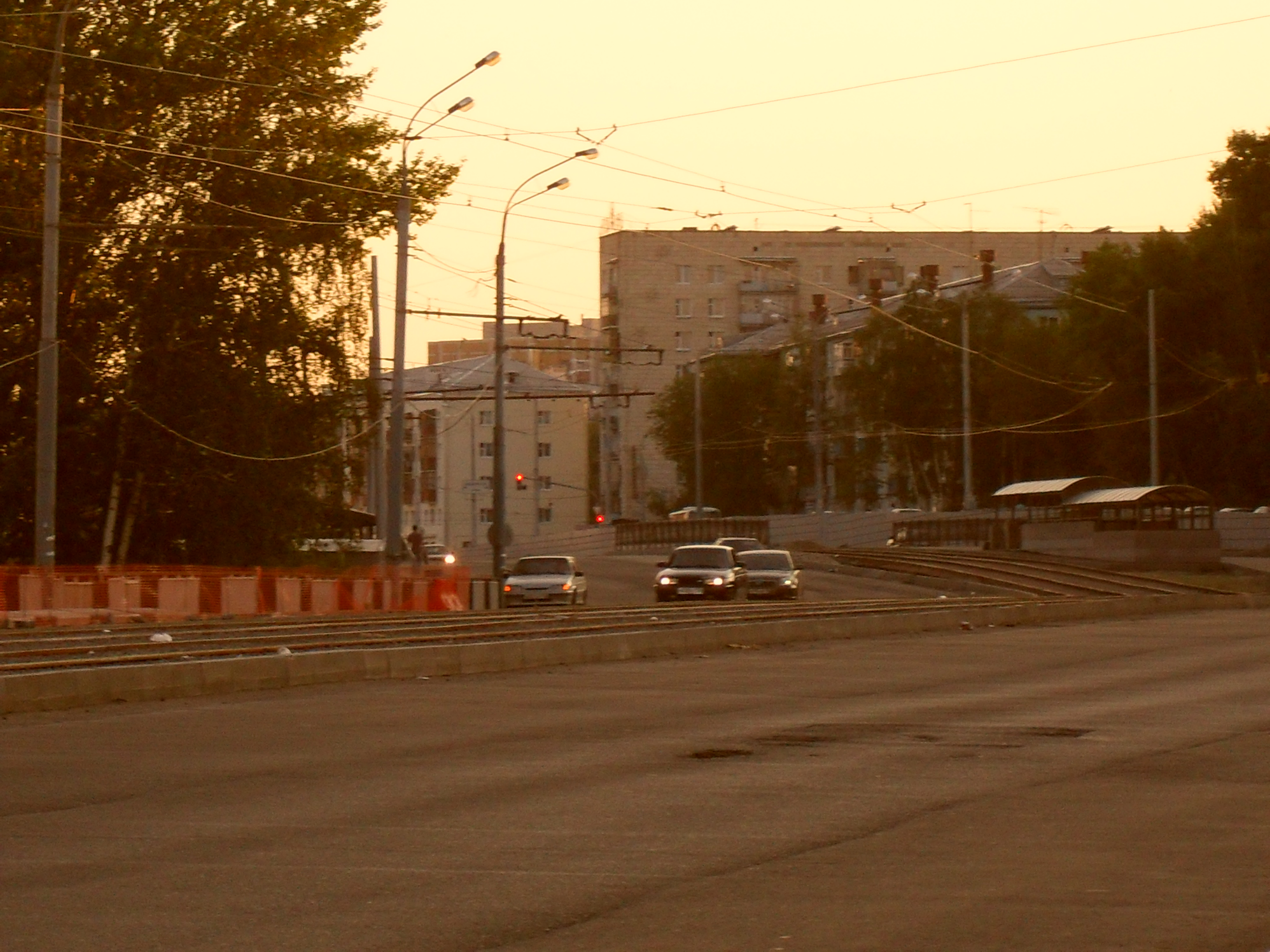 Выезд из туннеля развязки пр.Х. Ямашева-Декабристов-Ленская (проезжая часть пр.Х.Ямашева)